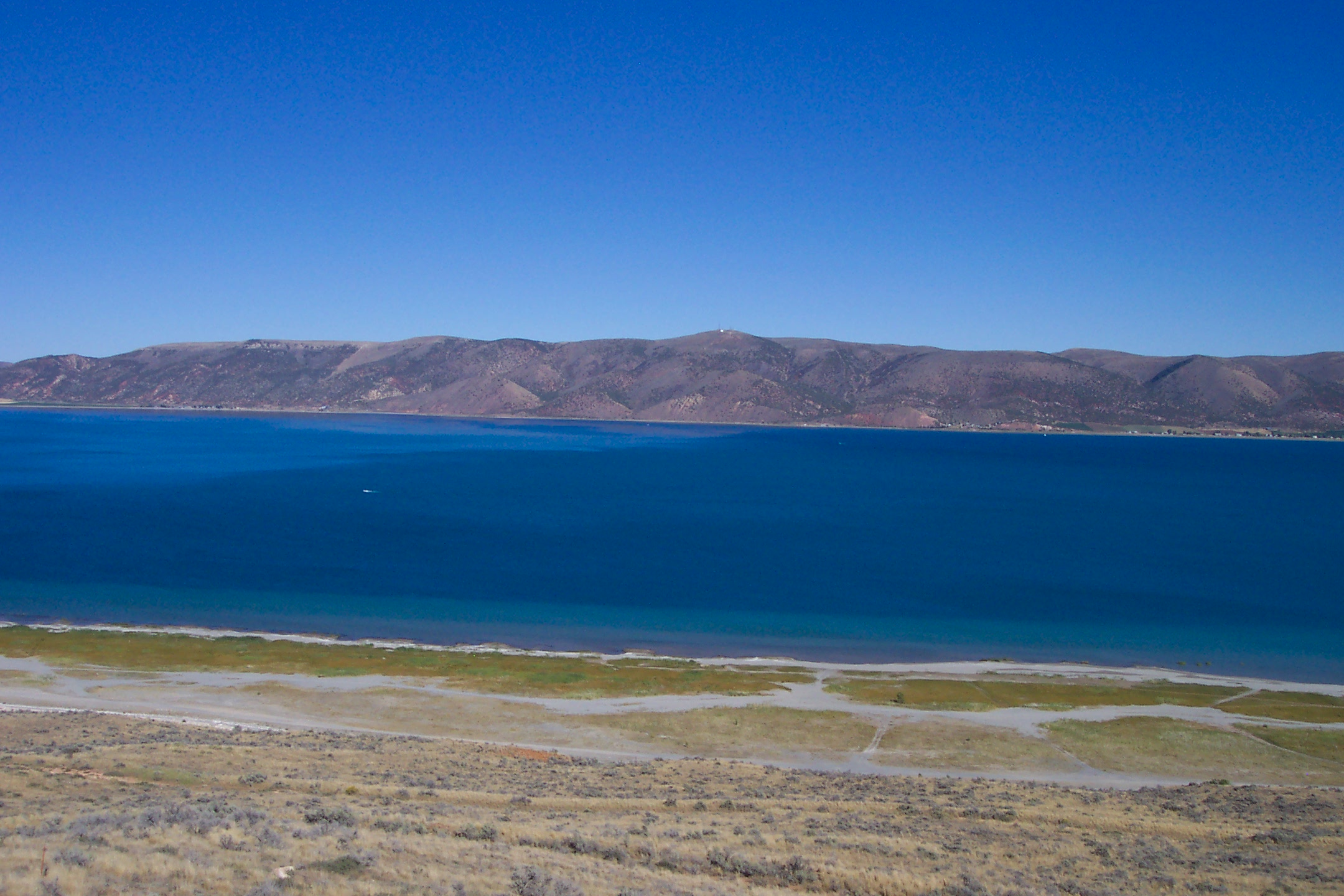 Bear Lake blue